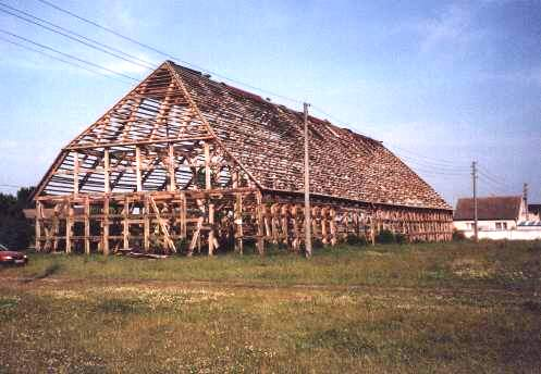 Große Fachwerkscheune Fritzow